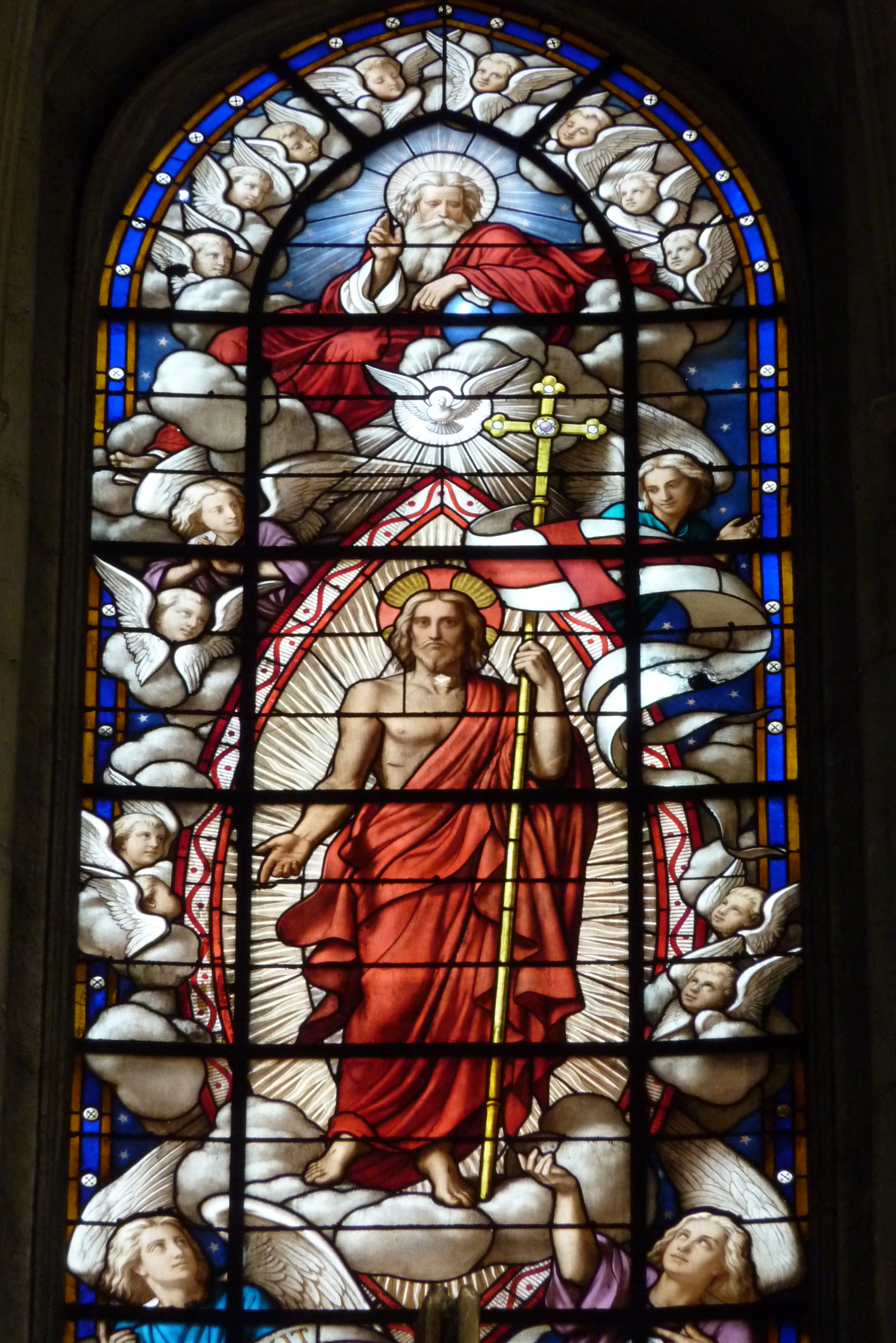 Bleiglasfenster in der katholischen Kirche Saint-Merry in Paris, Darstellung: Heilige Dreifaltigkeit